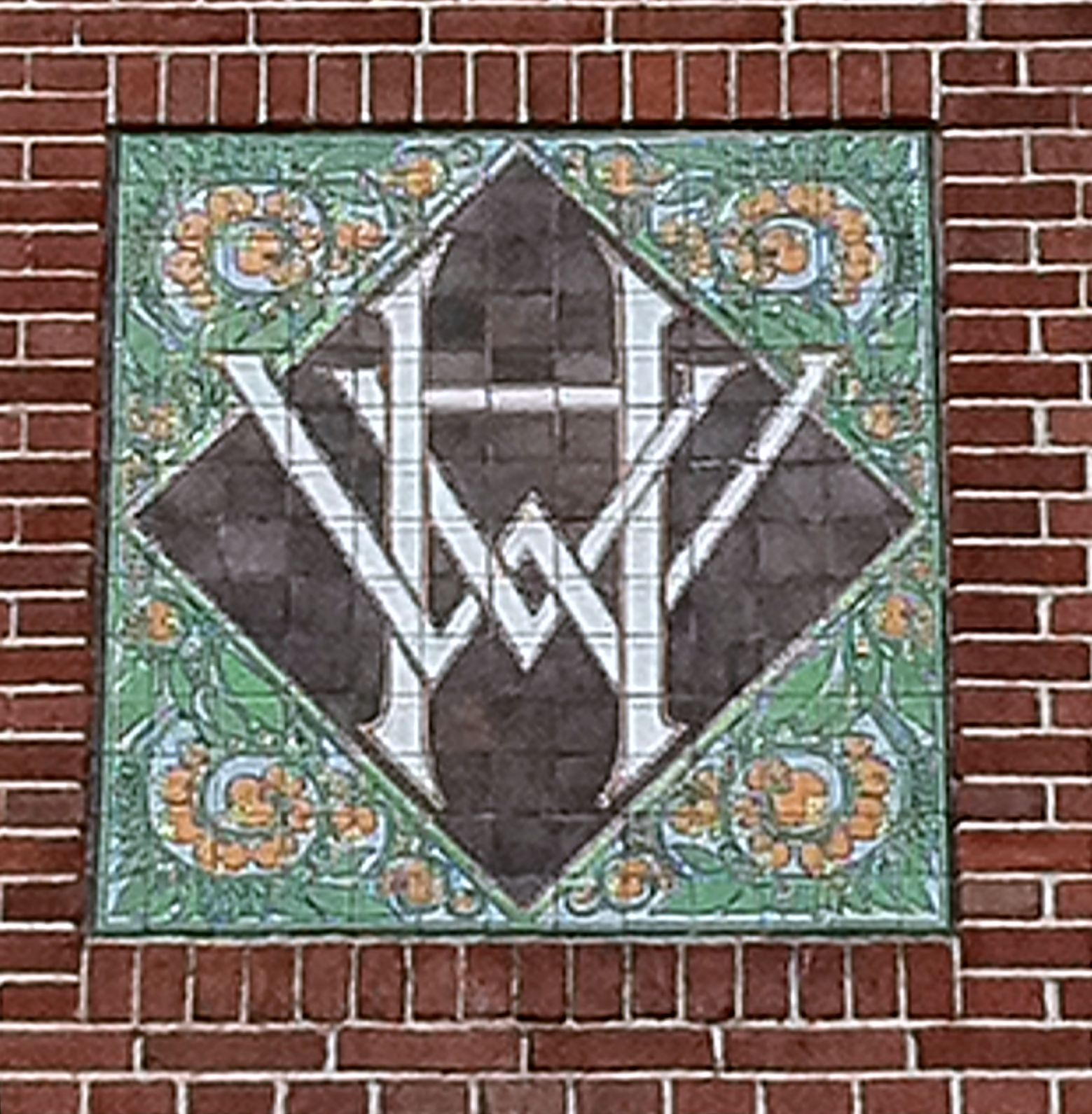 Het logo van de Handwerkers Vriendenkring, zoals te vinden in verschillende woonblokken die gebouwd zijn door de woningstichting